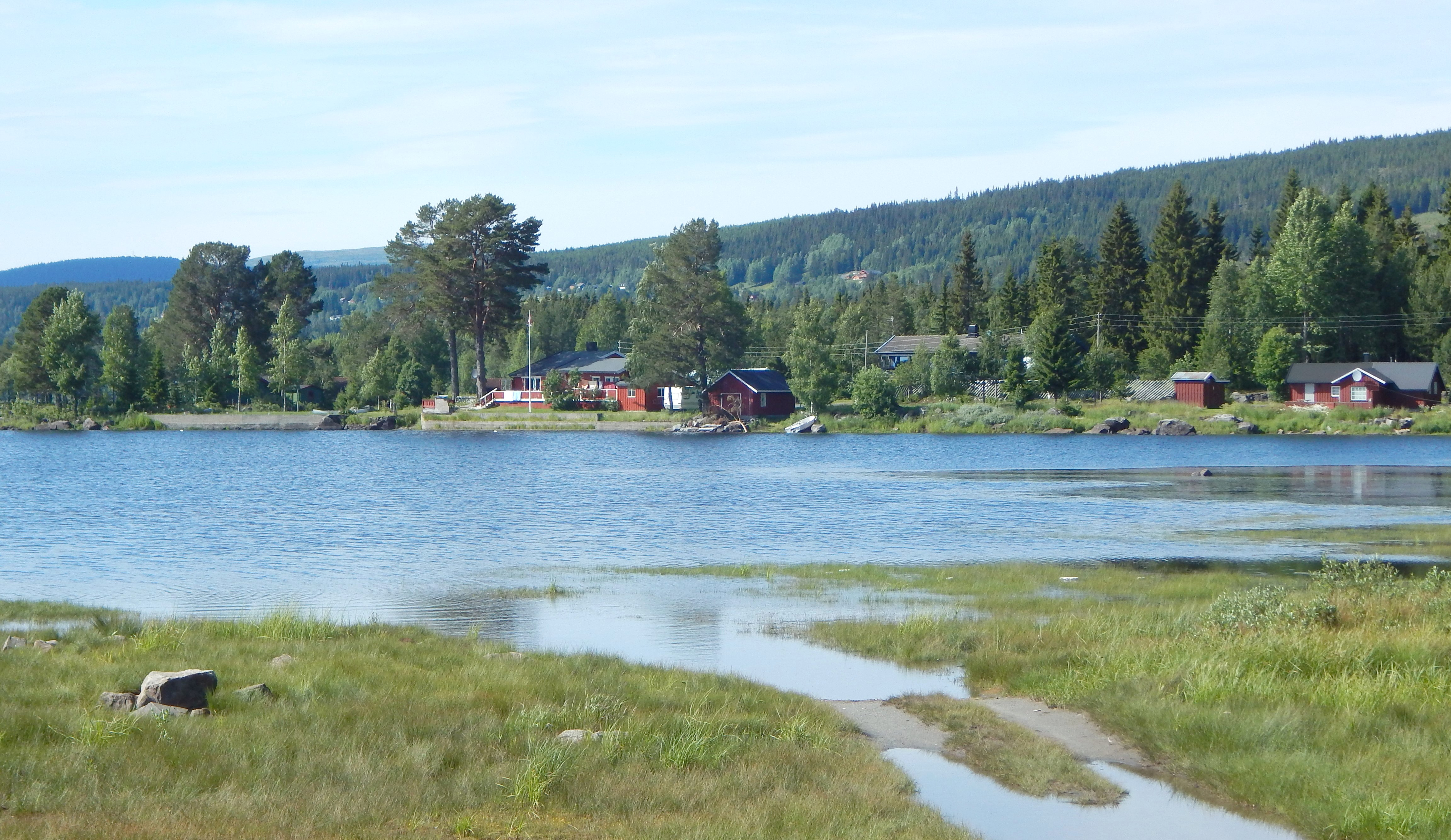 Nord-Mesna nær østenden